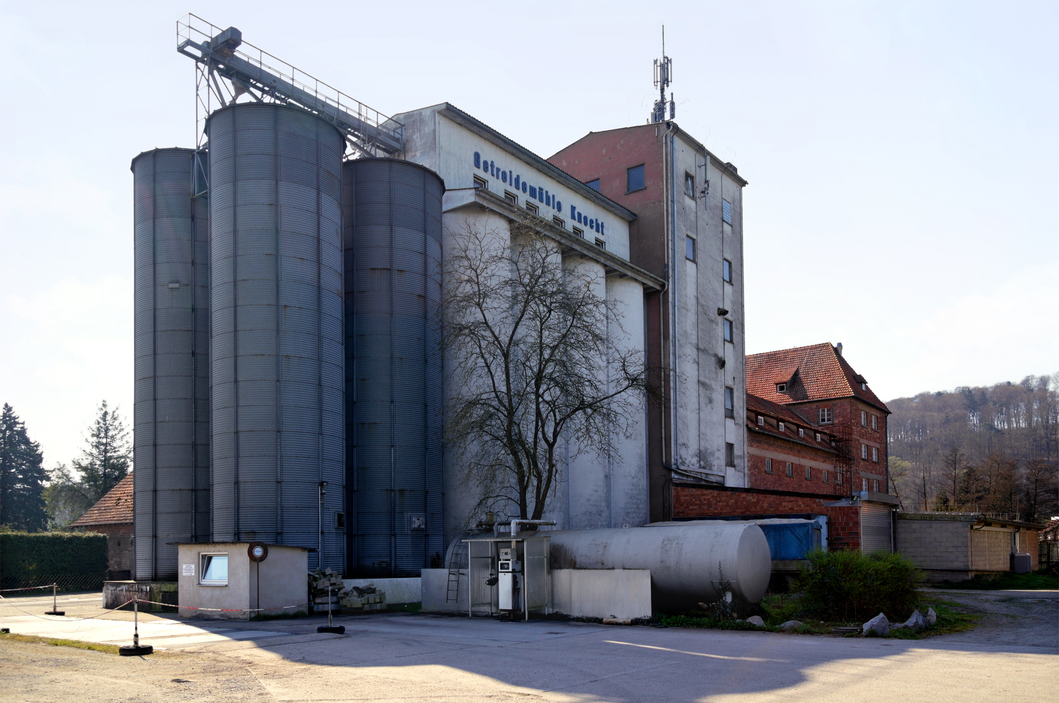 Getreidemühle Knecht in Obernburg am Main, Stadtteil Eisenbach, in Bayern, Deutschland.